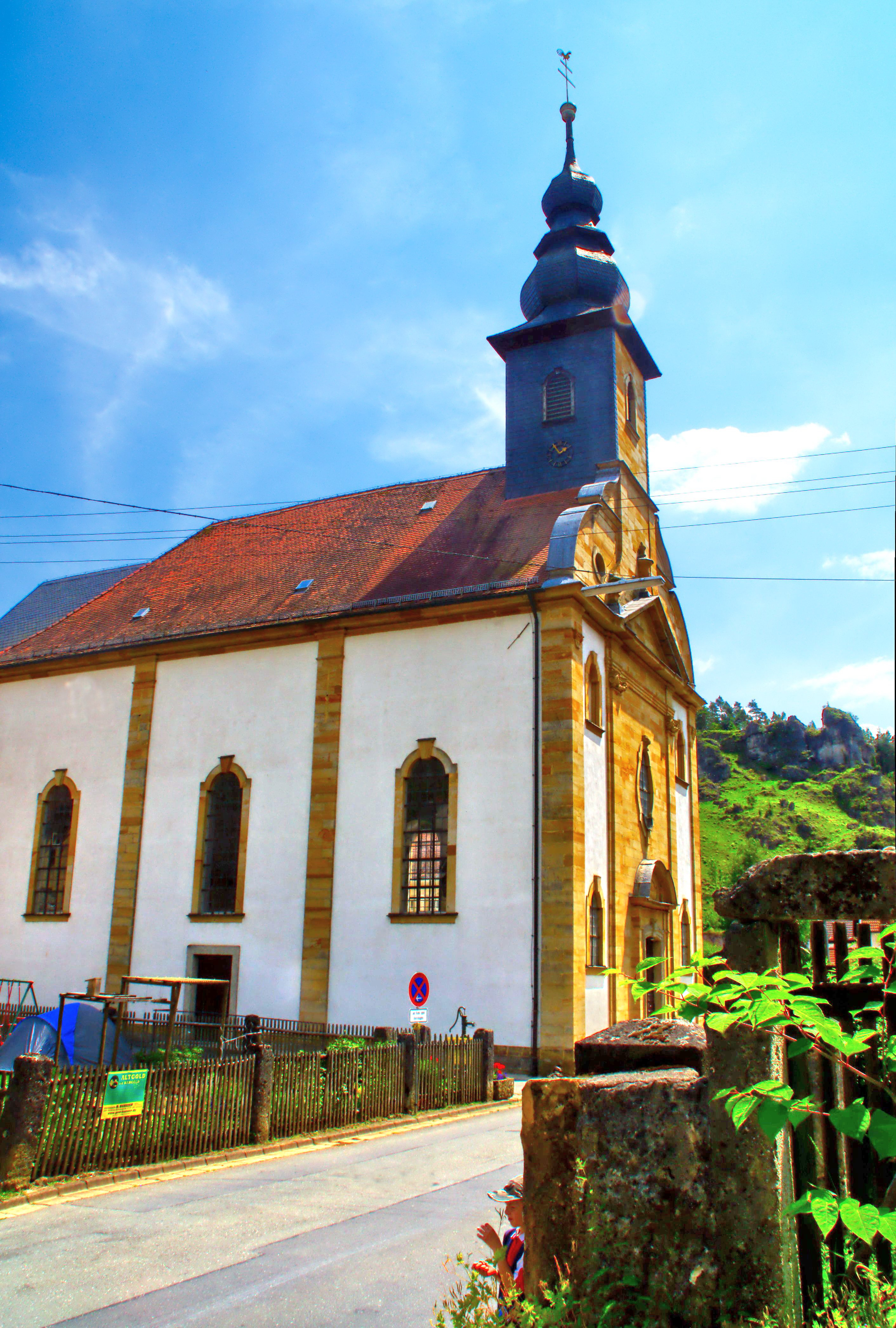 Kirche Oberaislfeld